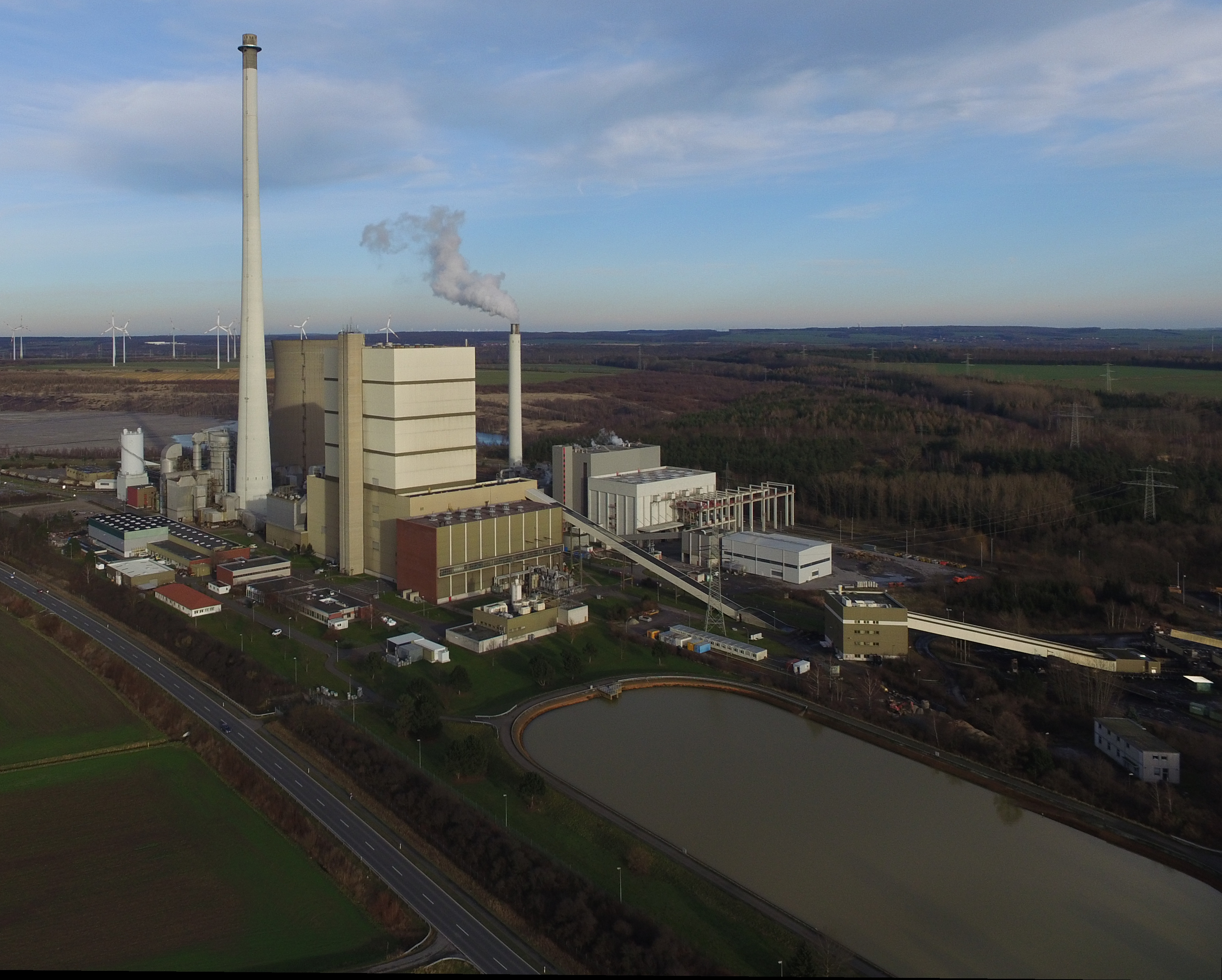 Luftbild Kraftwerk Buschhaus und 380-kV-Umspannwerk Buschhaus/KW